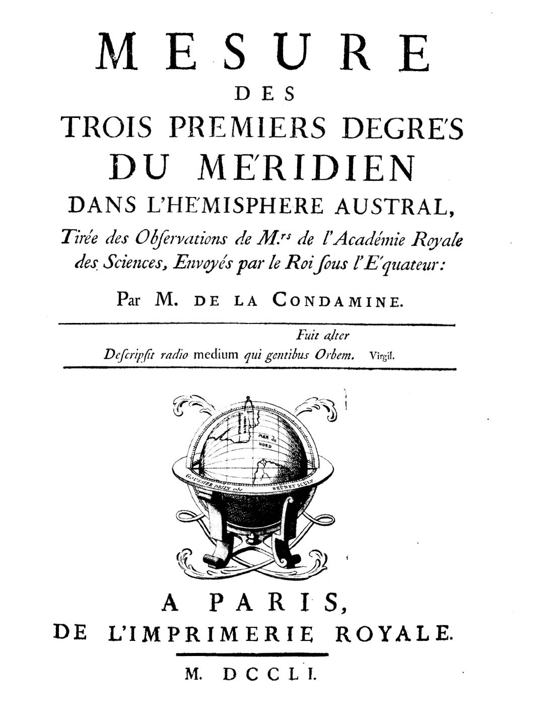 Mesure des trois premiers degrés du méridien dans l'hémisphère austral, tirée des observations de Mrs de l'Académie Royale des Sciences, envoyés par le roi sous l'Équateur: par M. de La Condamine. - Paris : de l'Imprimerie royale, 1751. - [12], 266, X p., III c. di tav. ripiegate : ill. ; 4º .